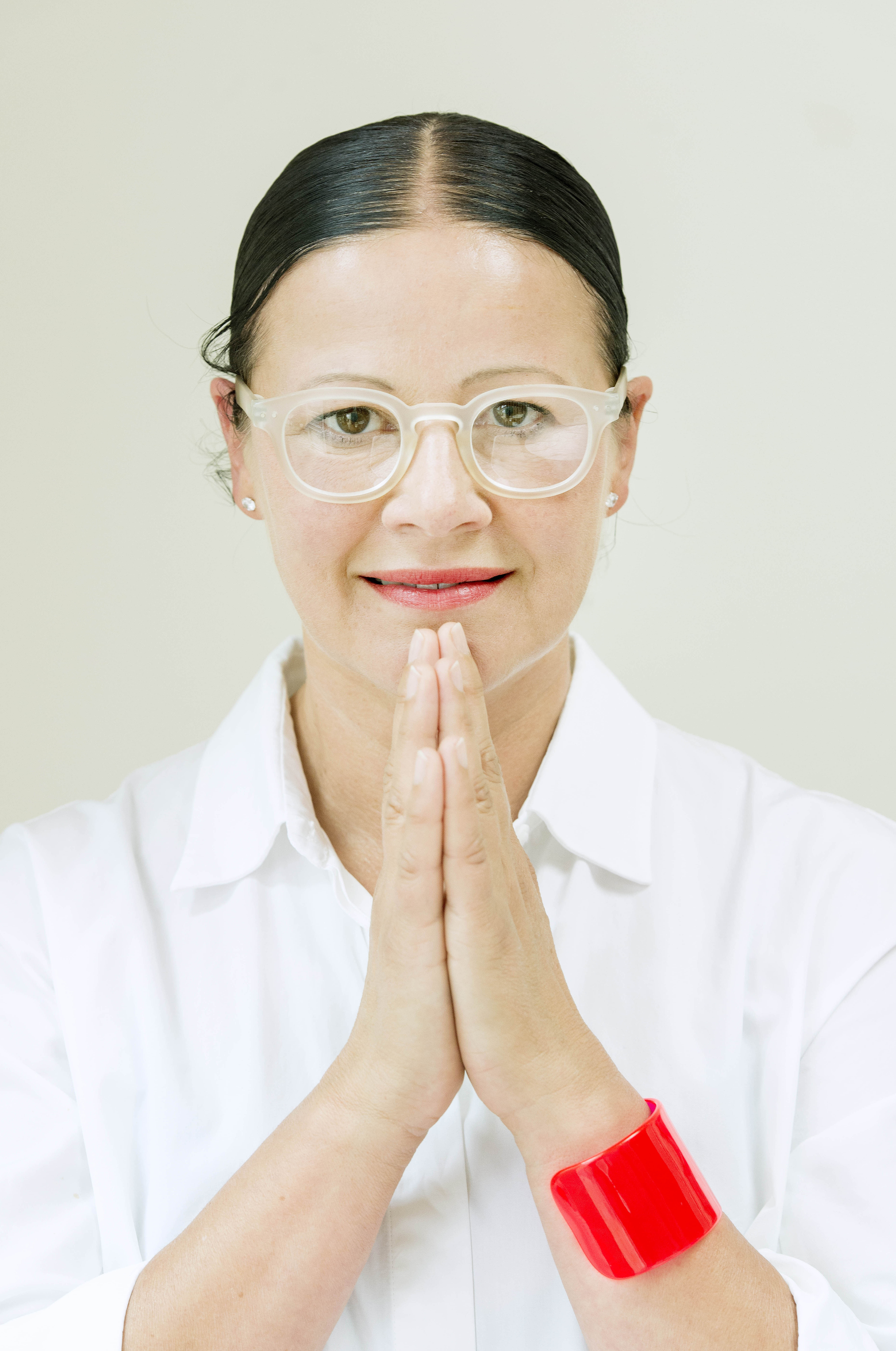 Chantal Pattyn, radiomaker.